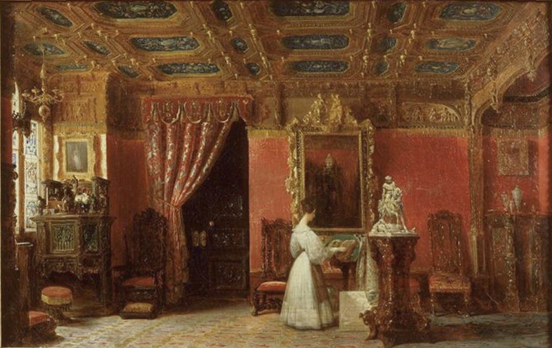 Atelier de la Princesse Marie D'Oreleans, future Duchesse de Wurtemberglabel QS:Lfr,"Atelier de la Princesse Marie D'Oreleans, future Duchesse de Wurtemberg"